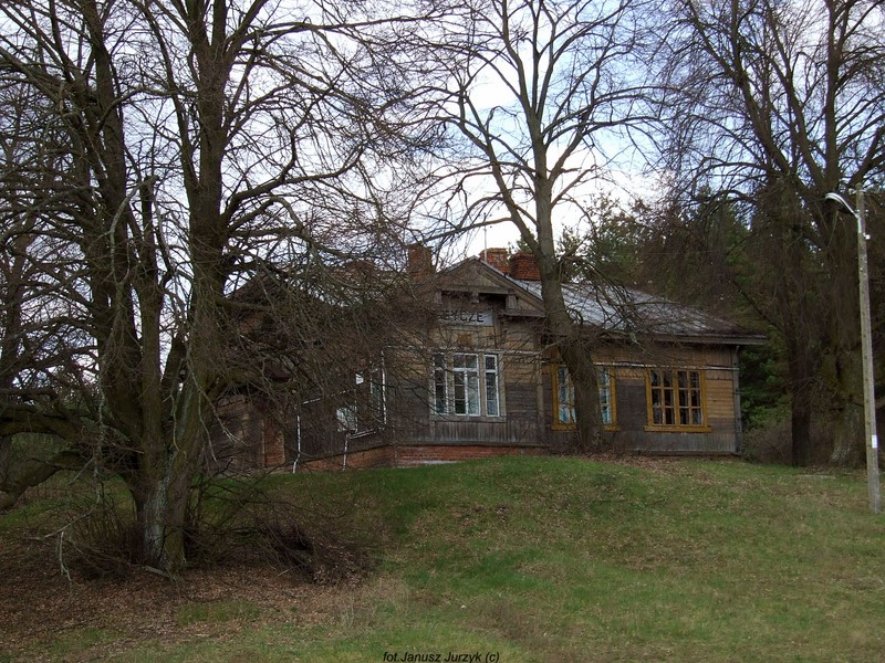 Sycze